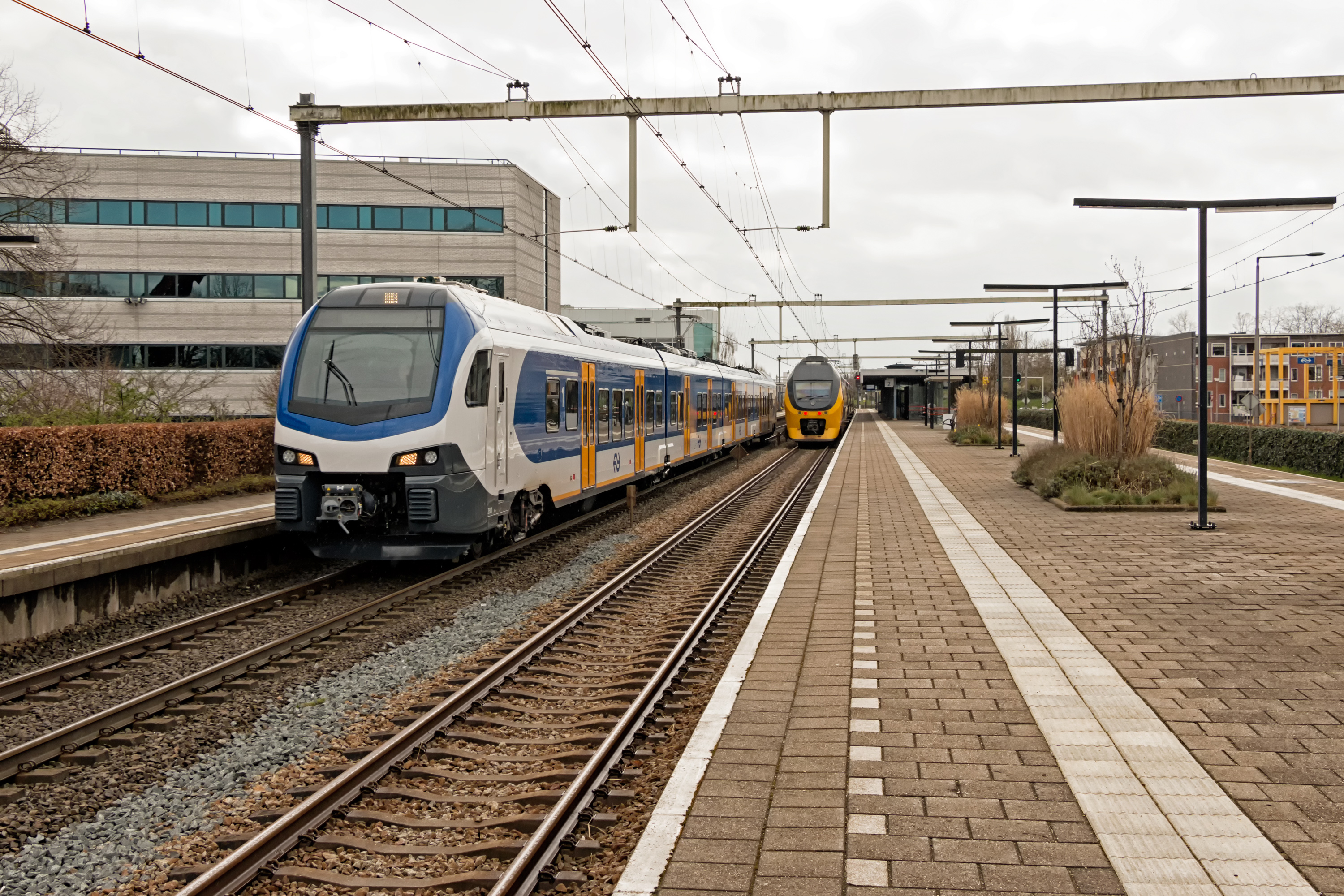 Het wachten werd beloond, na een paar dagen testen kwam Flirt3 2501 al gewoon door Amersfoort Schothorst.